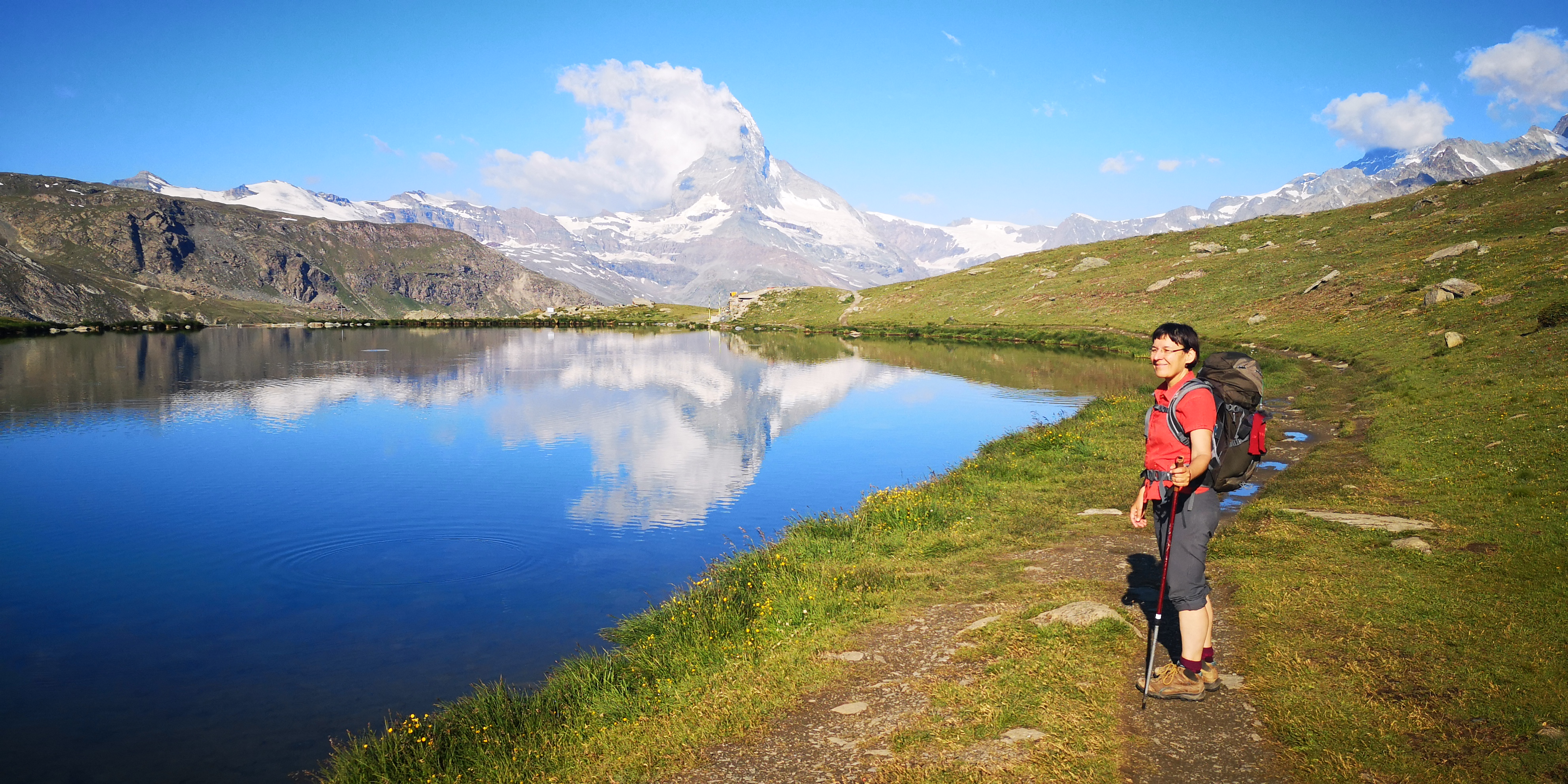 Das Matterhorn mit der charakteristischen "Matterhornwolke" an der windabgewandten Seite des Gipfels